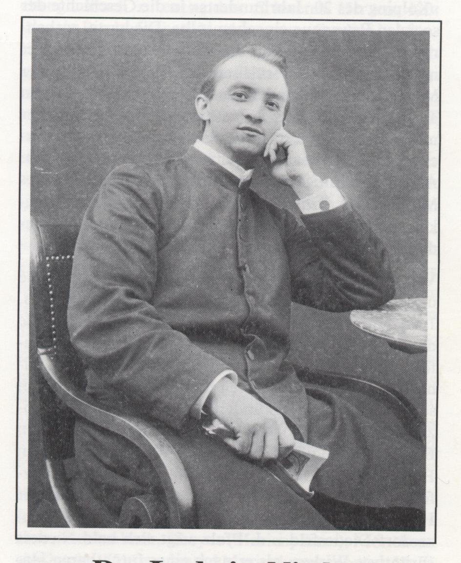 Pfarrer Dr. Ludwig Nieder, Speyer, Sozialreformer